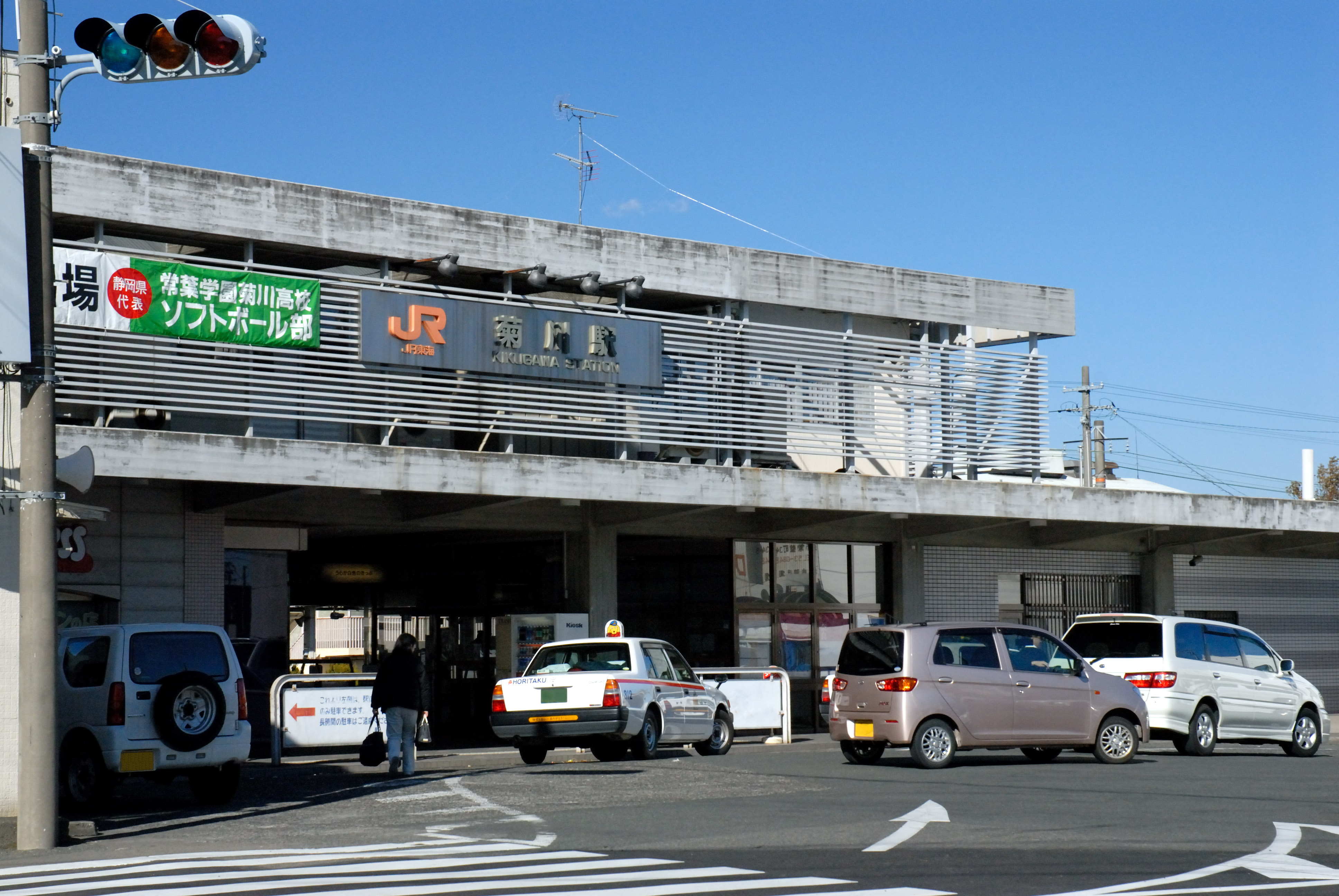 Kikugawa Station of Central Japan Railway Company, Kikugawa, Shizuoka Japan.